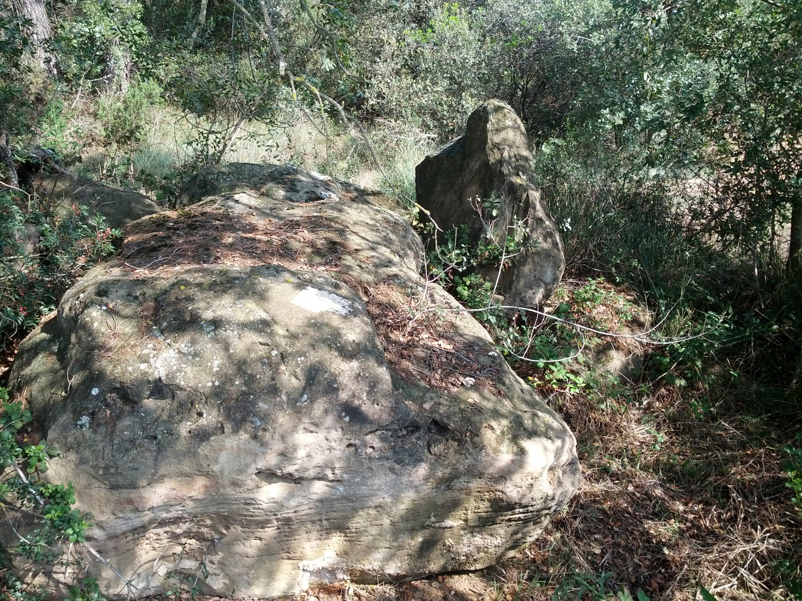 Megalits que es troben al Pla de Montargull